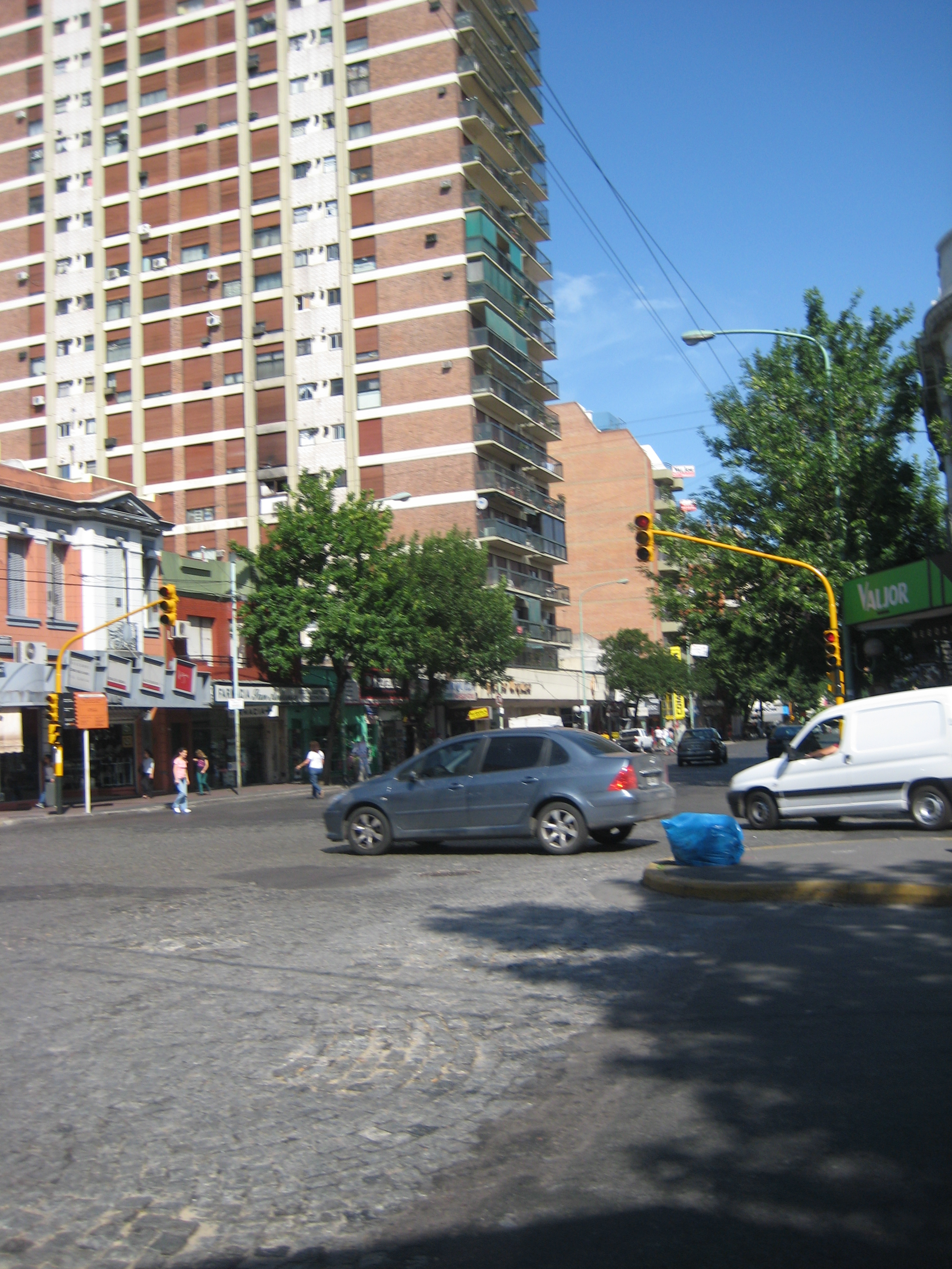 Triunvirato Avenue, viewed from Mendoza Avenue. Villa Urquiza, Buenos Aires.